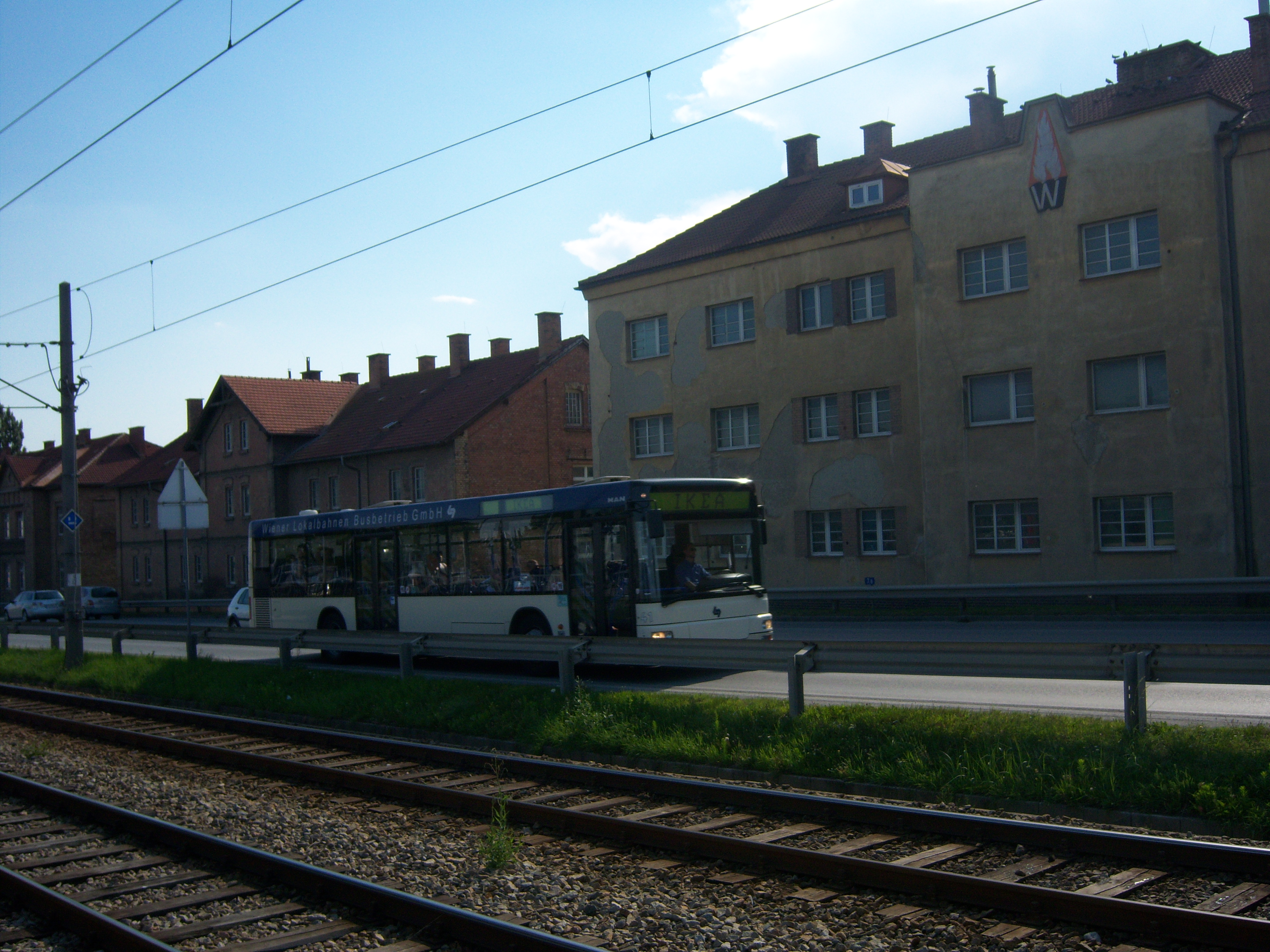 Bus der Wiener Lokalbahnen